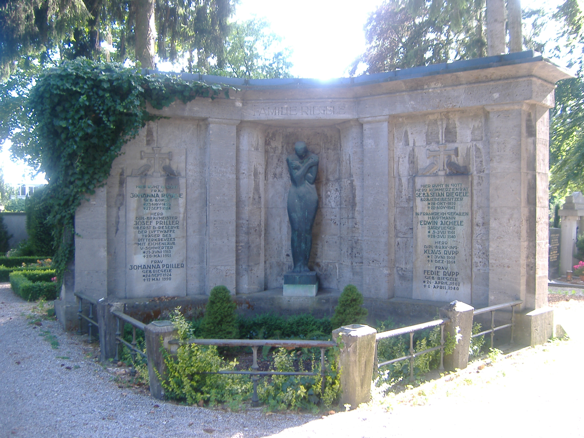 Familiengrab der Bierbraudynastie Riegele